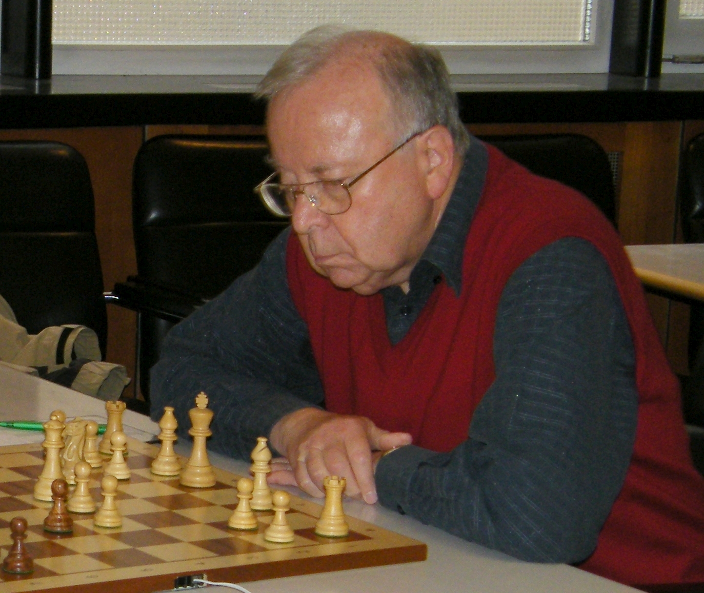 Wolfgang Uhlmann bei der 3. Runde der Schach-Bundesliga 2008/09 im Rathaus Schöneberg in Berlin